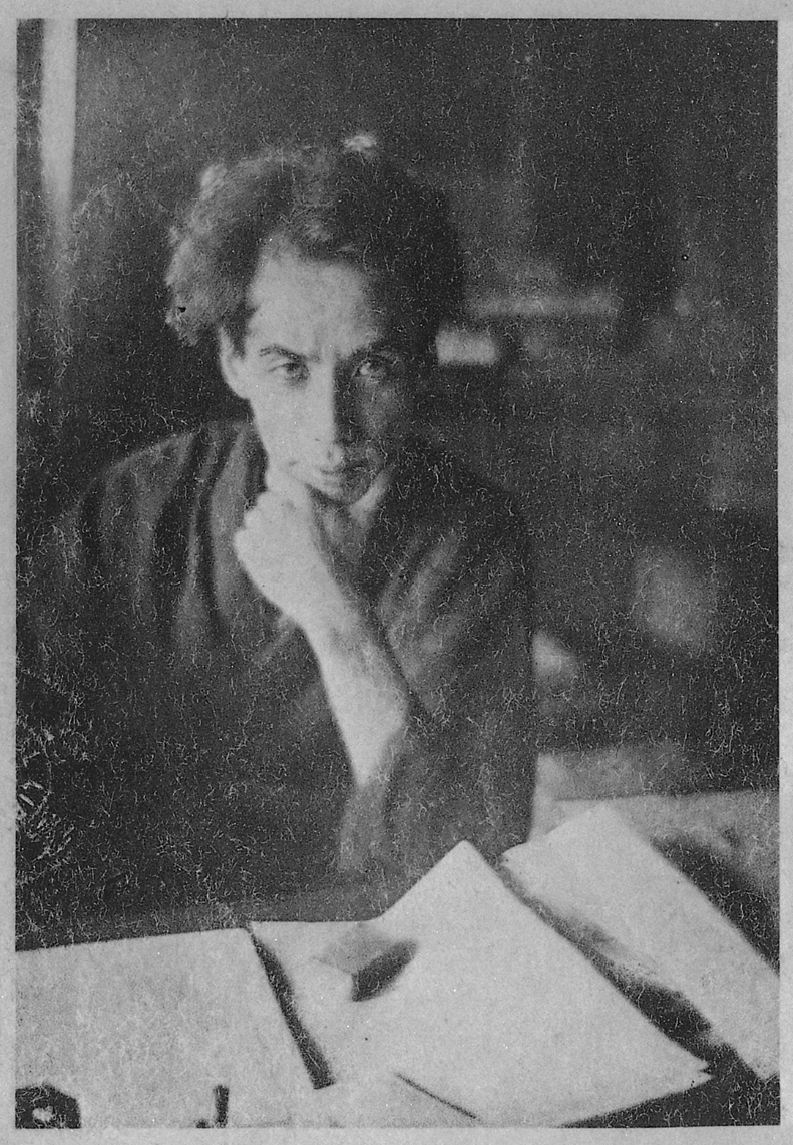 Portrait of Akutagawa Ryunosuke (芥川龍之介, 1892 – 1927)